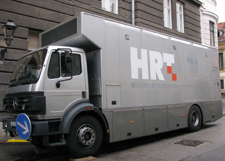 Reportažna kola Hrvatske radio televizije pored Hrvatskog sabora